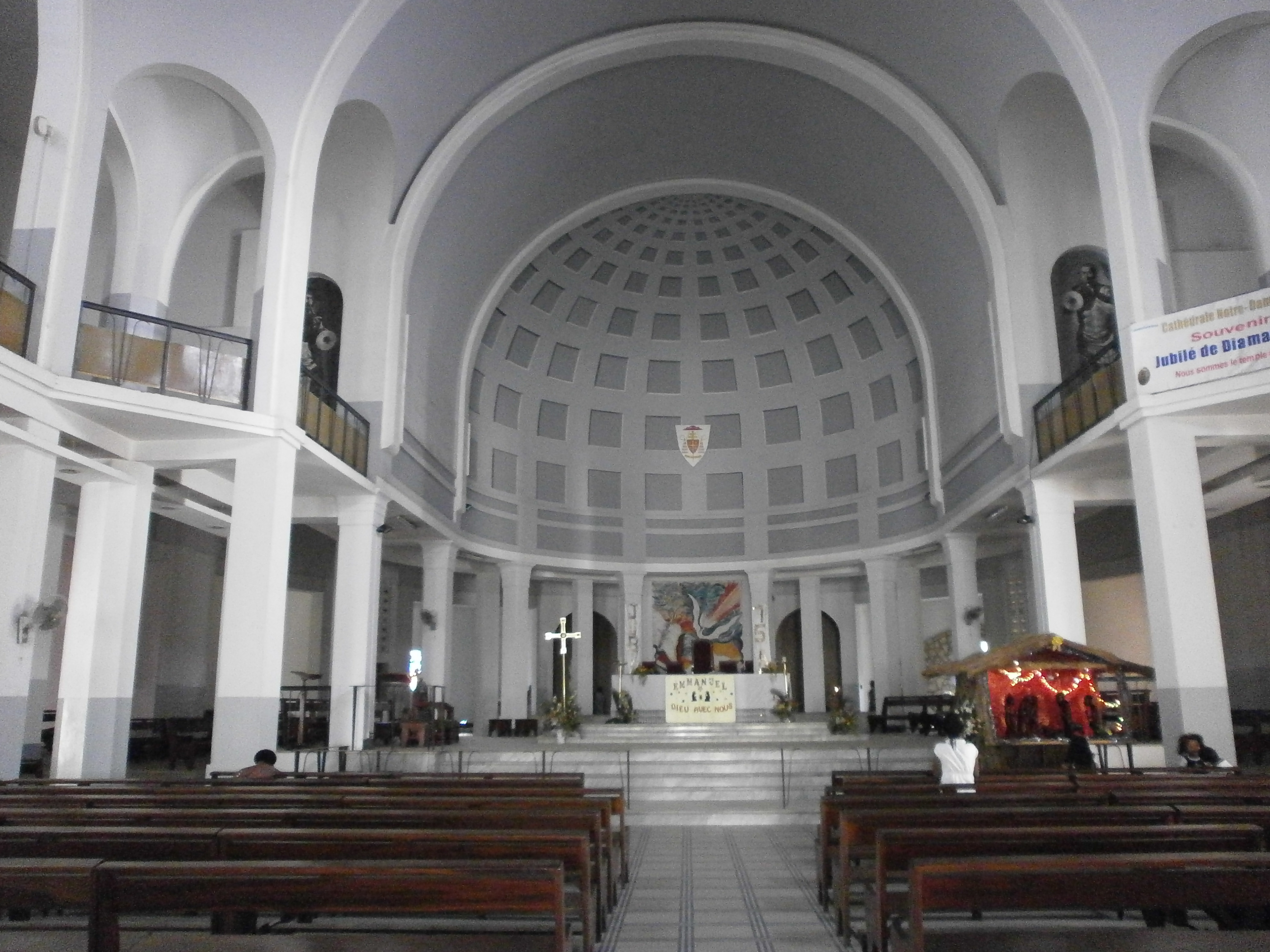 Dakar - Choeur de la Cathédrale